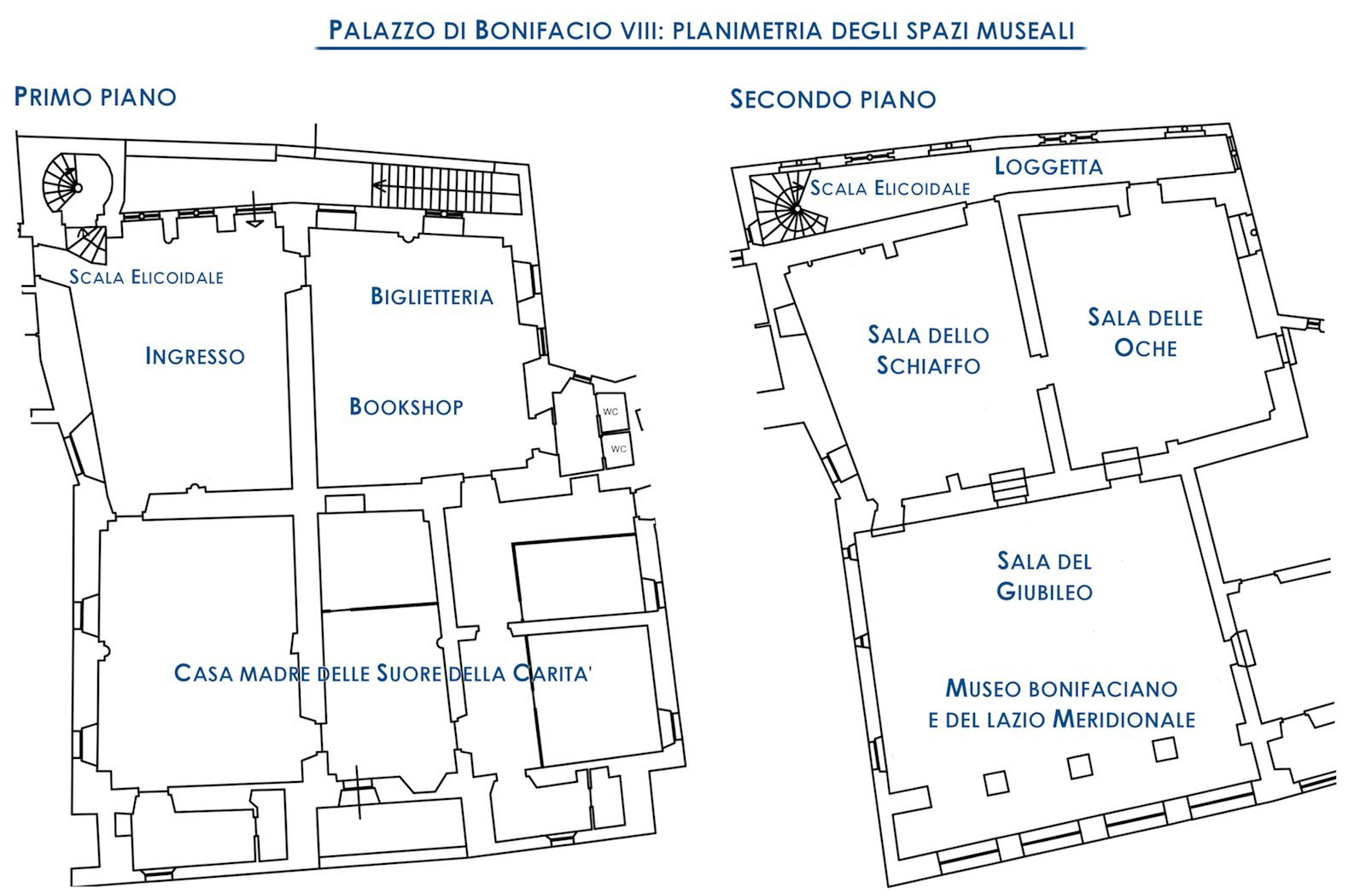 Planimetria degli spazi museali Palazzo Bonifacio VIII, rielaborazione della pianta liberamente concessa dalla direzione museale.